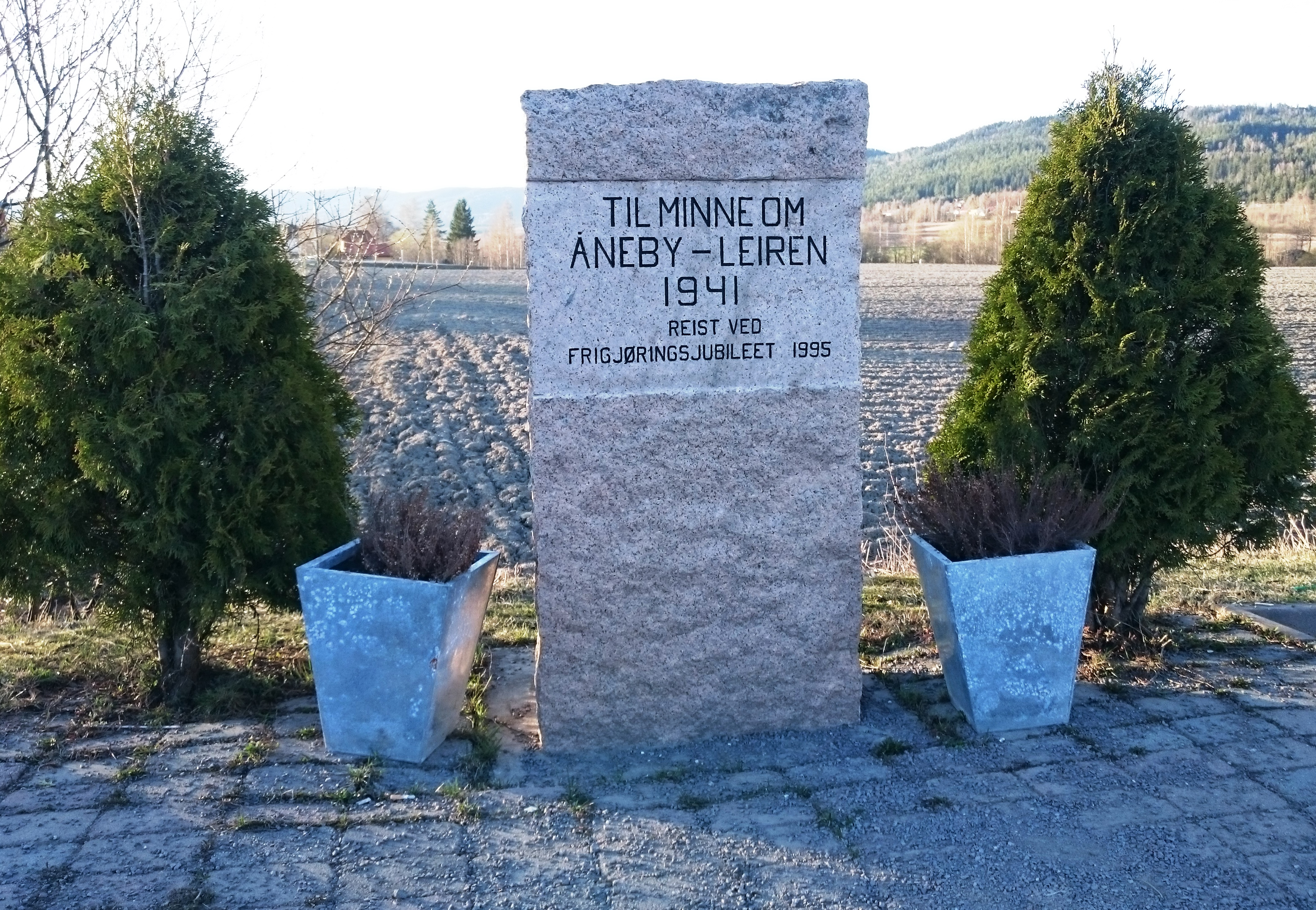 Minnemerke over Ånebyleiren.